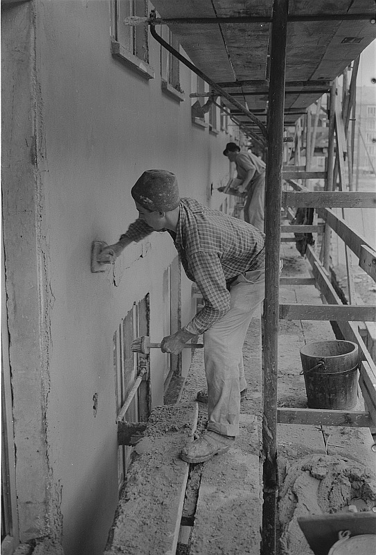 Original image description from the Deutsche Fotothek Maurerlehrlinge auf dem Leitergerüst beim Glätten von Außenputz mit Reibebrett und Pinsel